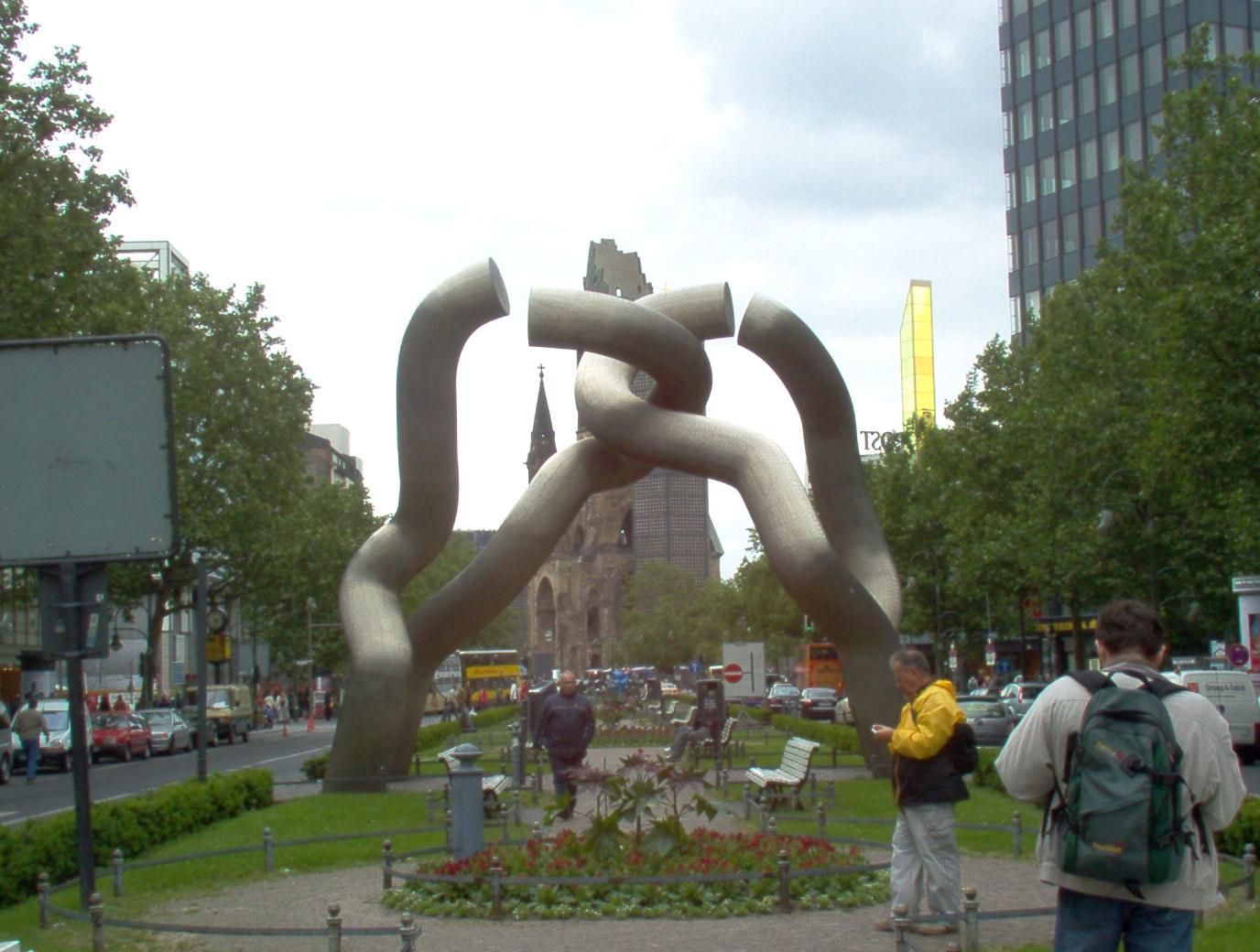 Sculpture "Berlin" (1985/1987) Tauentzienstrasse in Charlottenburg/Berlin/Germany